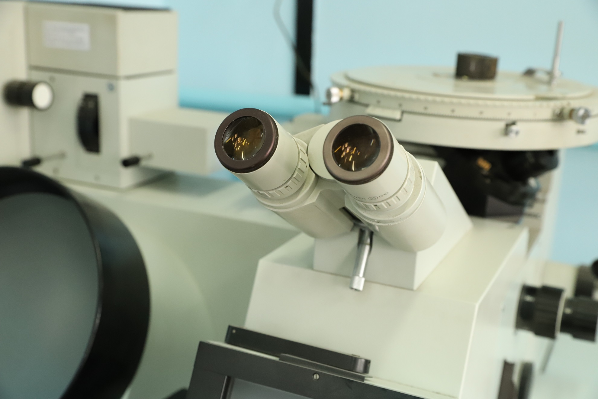 ПРоведення аналізу металів